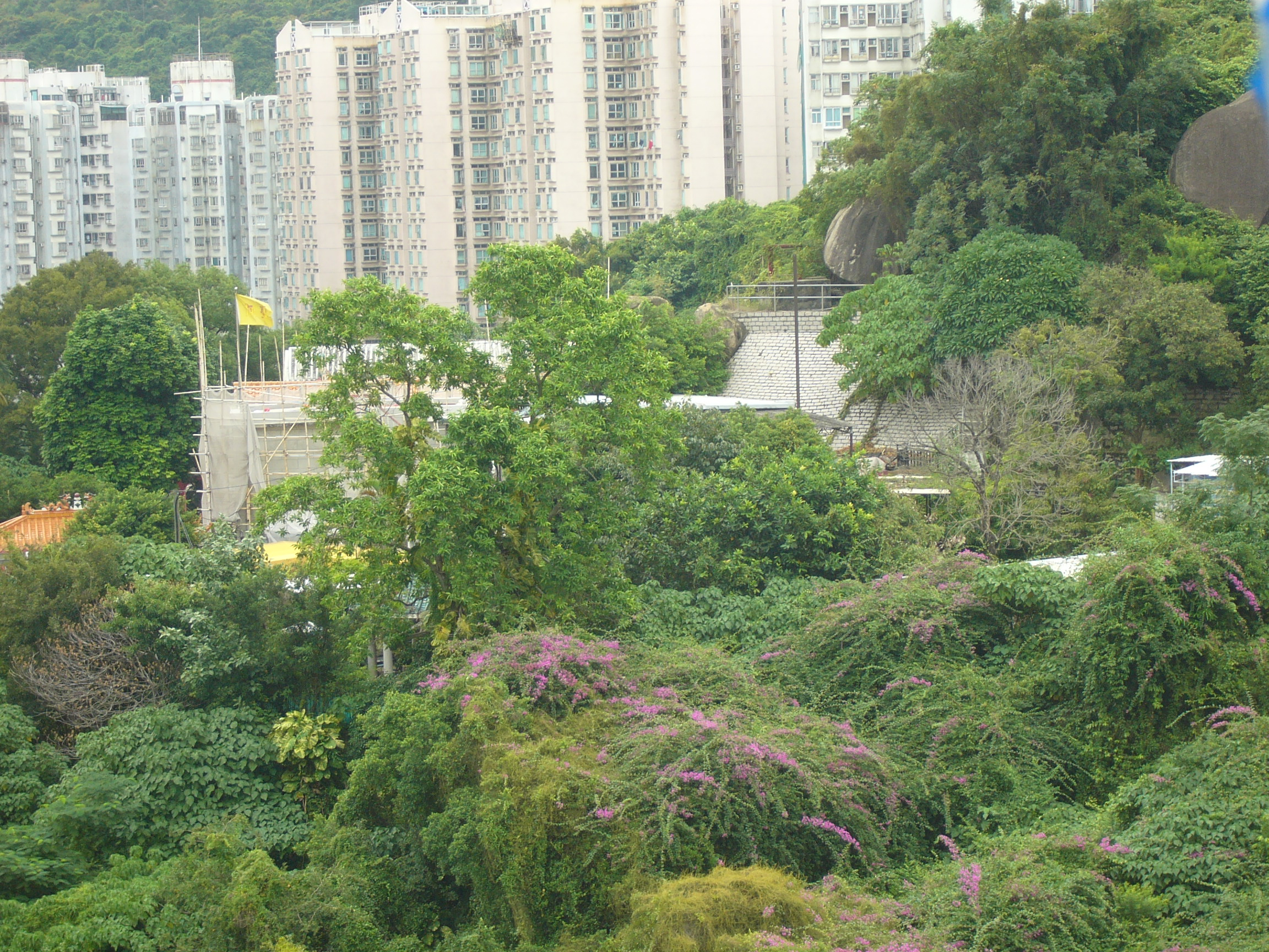 中文（香港）: 香港屯門三聖廟。